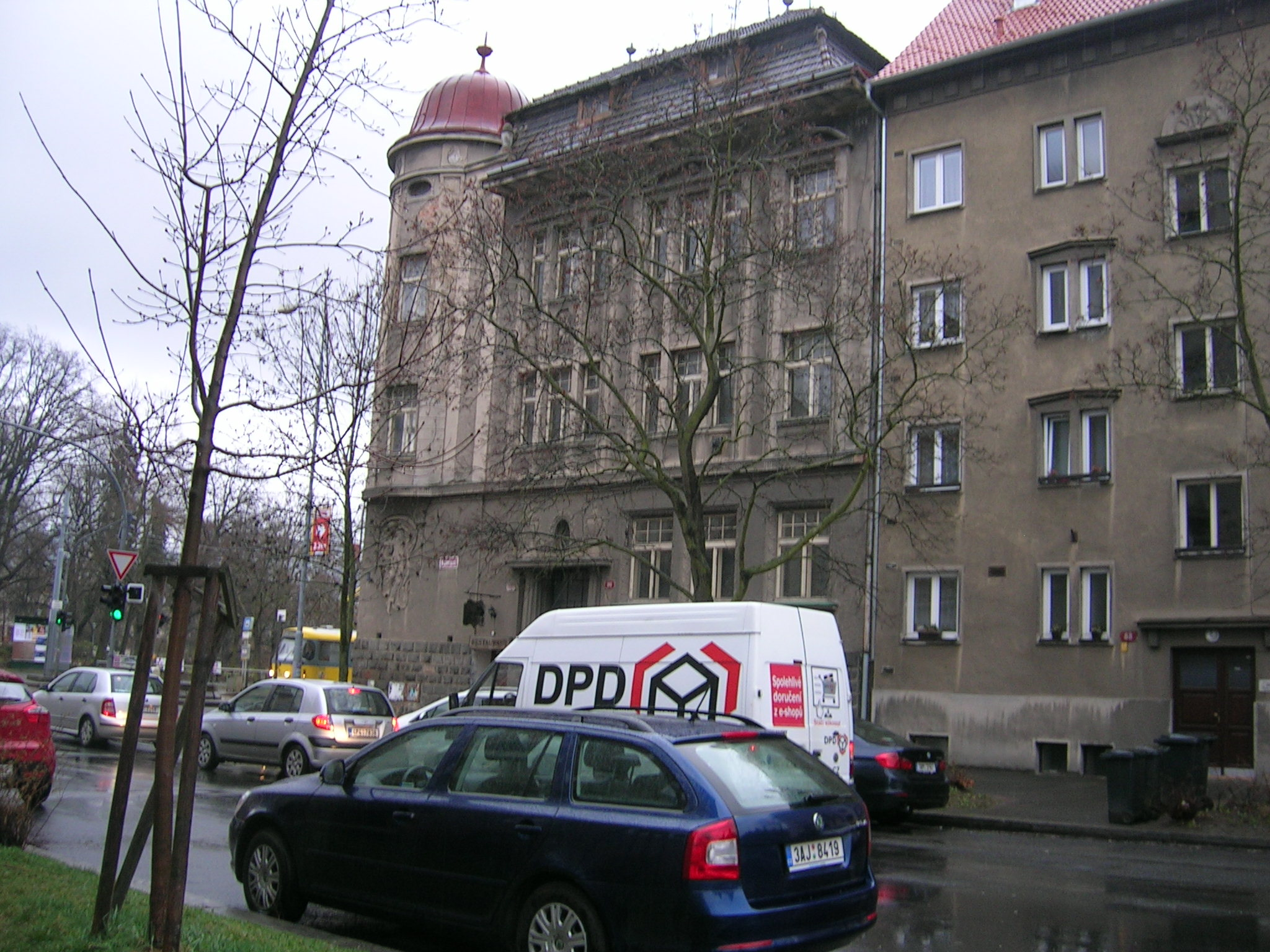 Činžovní dům v Mánesově ulici č.90